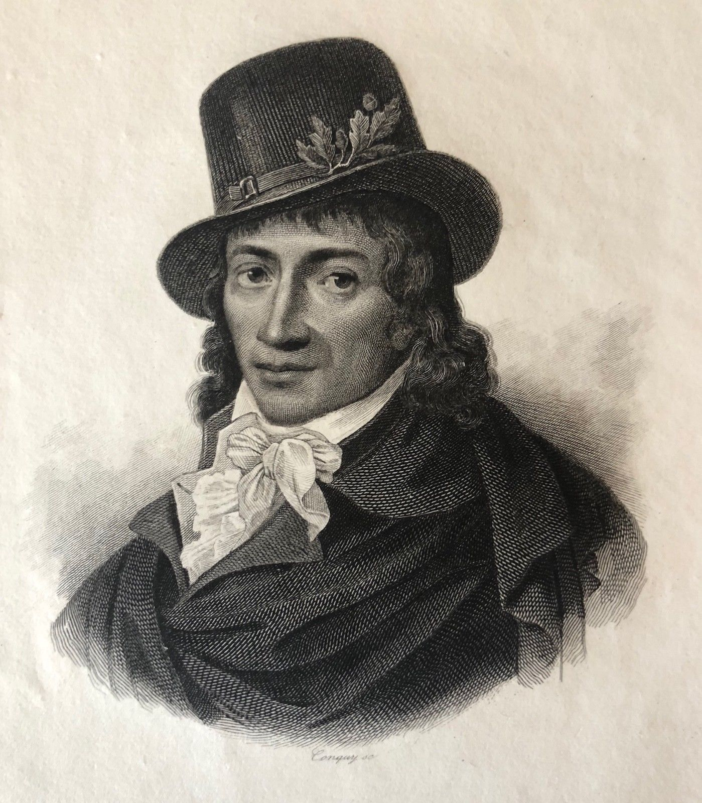 Gravure sur acier représentant Camille Desmoulins.